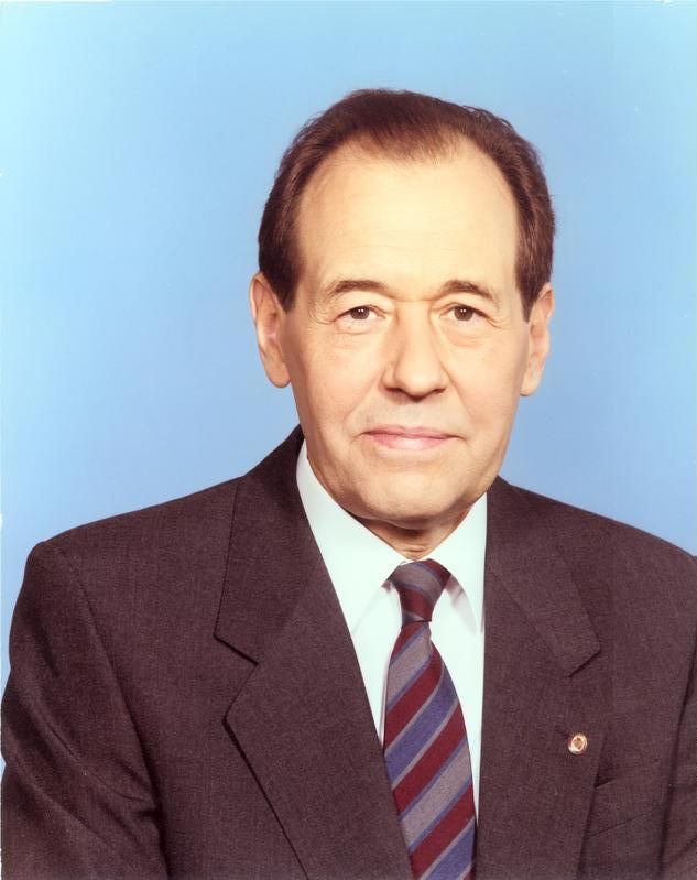 ADN-ZB/DEWAG/4.7.88/Berlin Joachim Herrmann, Mitglied des Politbüros und Sekretär des ZK der SED.